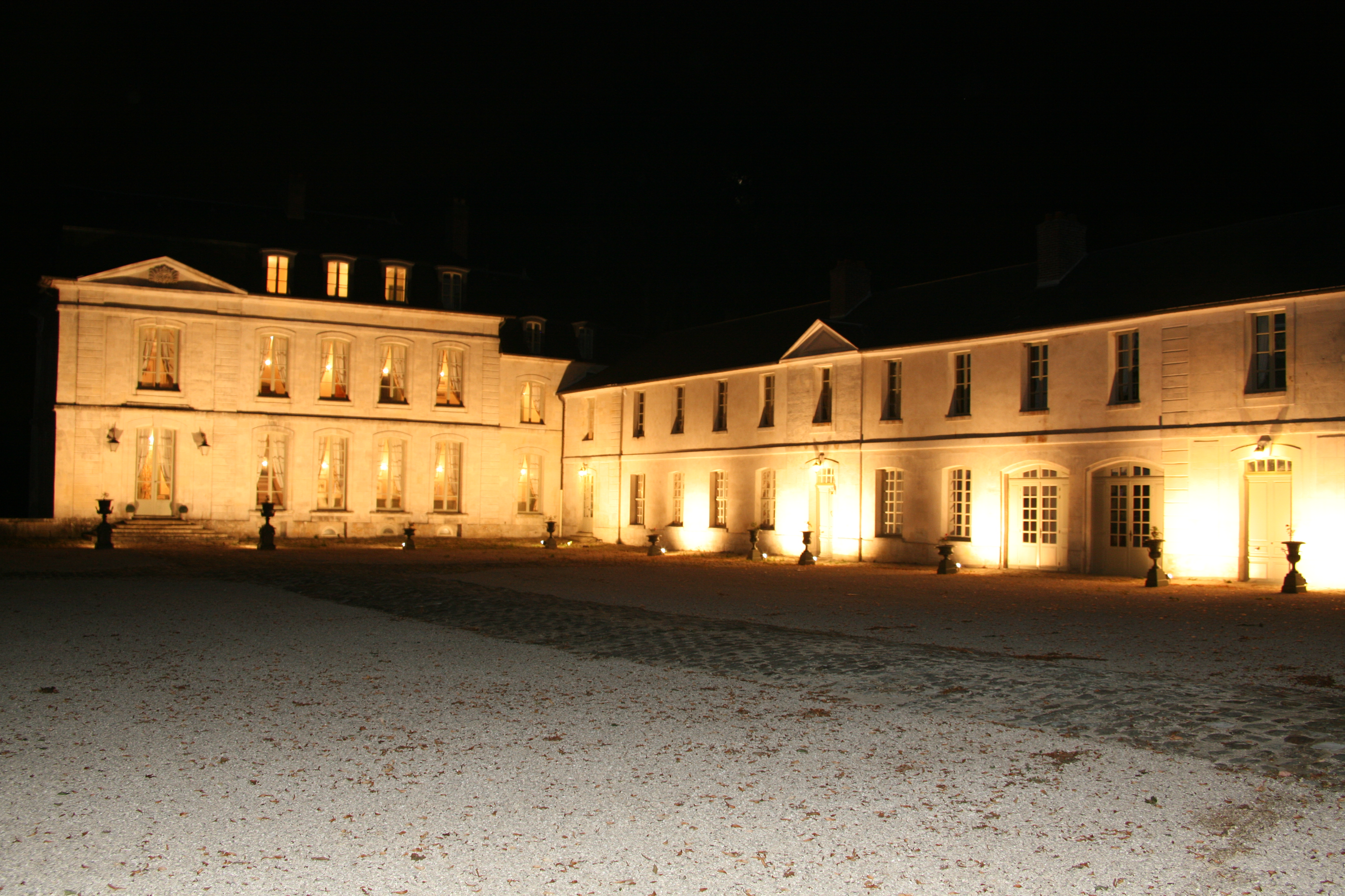 Chateau de Nuit